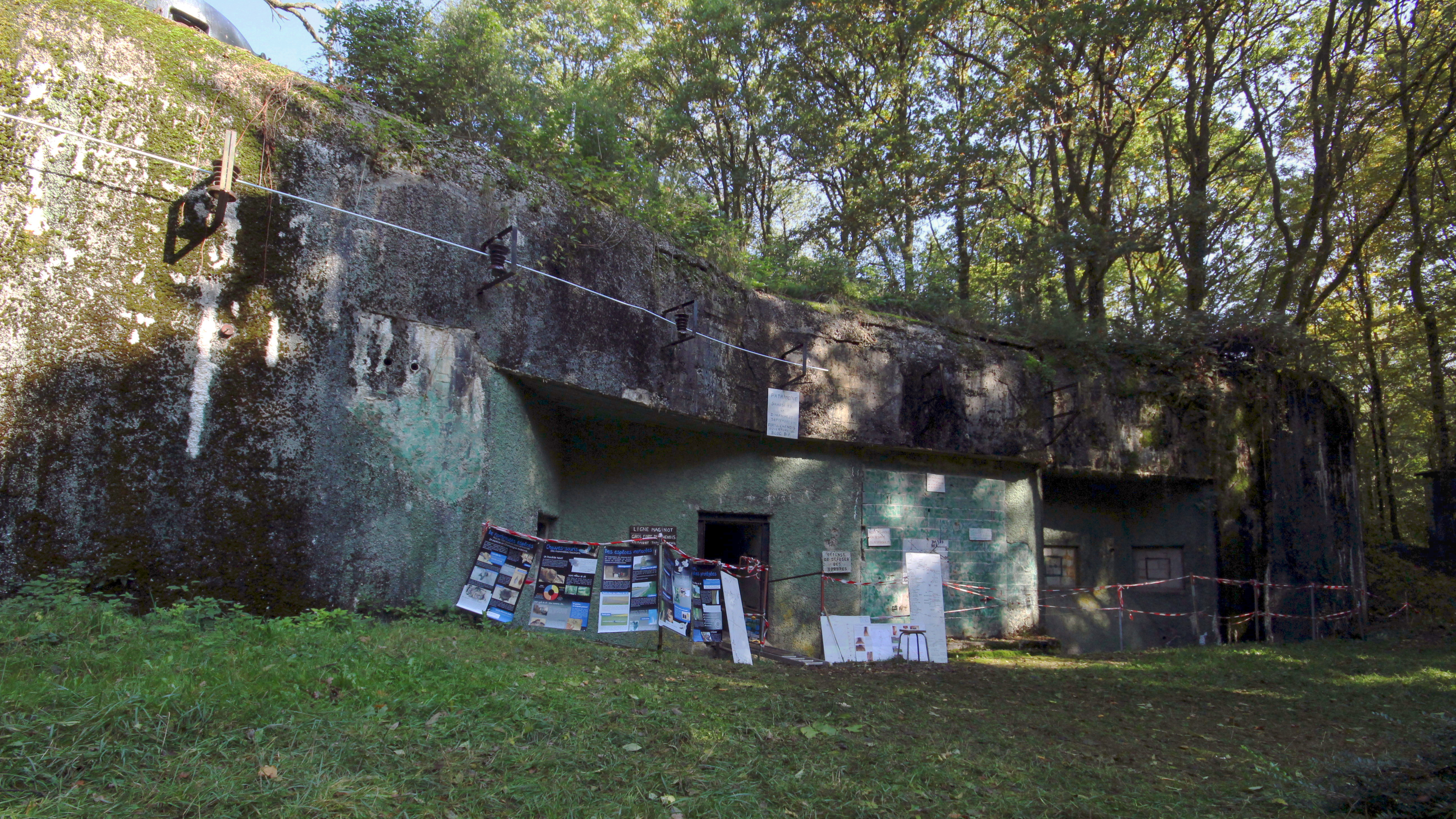 Ouvrage du Chenois (entrée mixte B7)